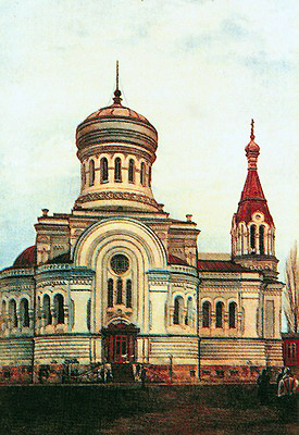 Собор во имя архистратига Михаила во Владикавказе. Фотография. Нач. XX в.